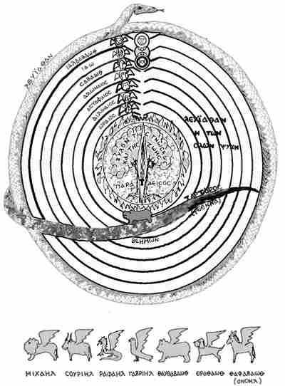 Das Ophitendiagramm, Gesamtansicht